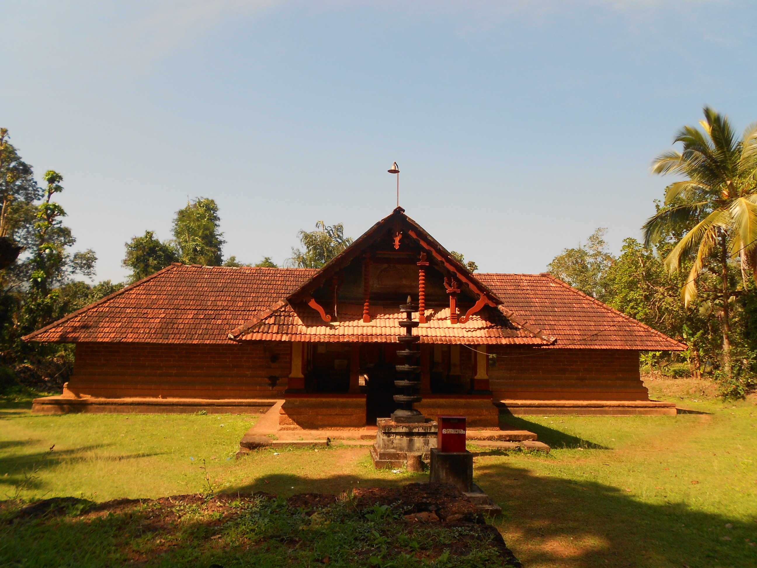 കോട്ടയം പഴശ്ശിരാജാവിന്റെ കുടുംബക്ഷേത്രമായിരുന്ന മൃദംഗശൈലേശ്വരീ ക്ഷേത്രം.